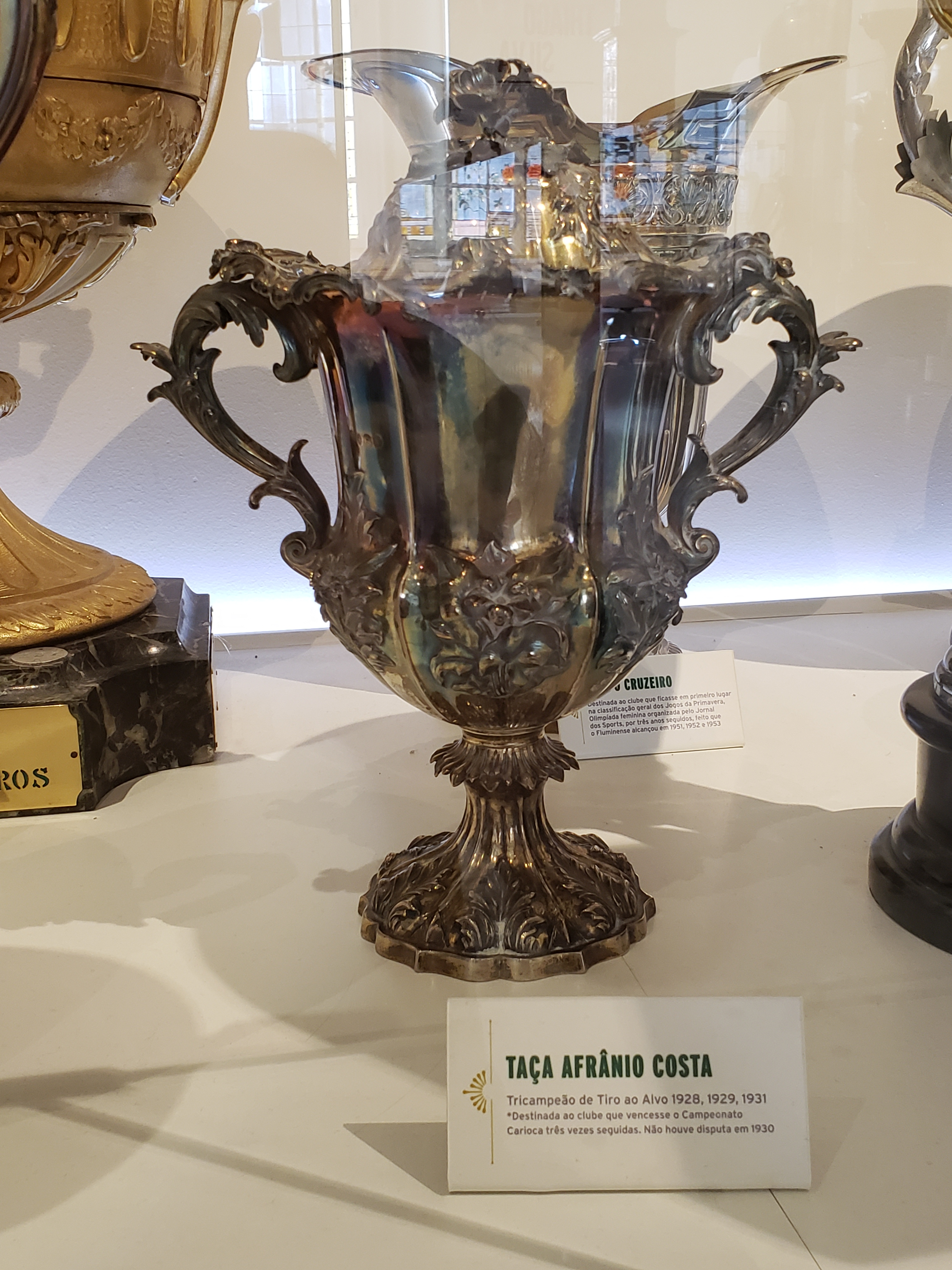 Taça Afrânio Costa de Tiro ao Alvo ao clube que vencesse o Campeonato Carioca por três vezes consecutivas (1928-29-31, pois não houve competição em 1930), conquistada pelo Fluminense Football Club.